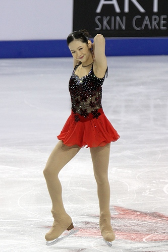 Haruka IMAI at the 2010 Skate Canada International